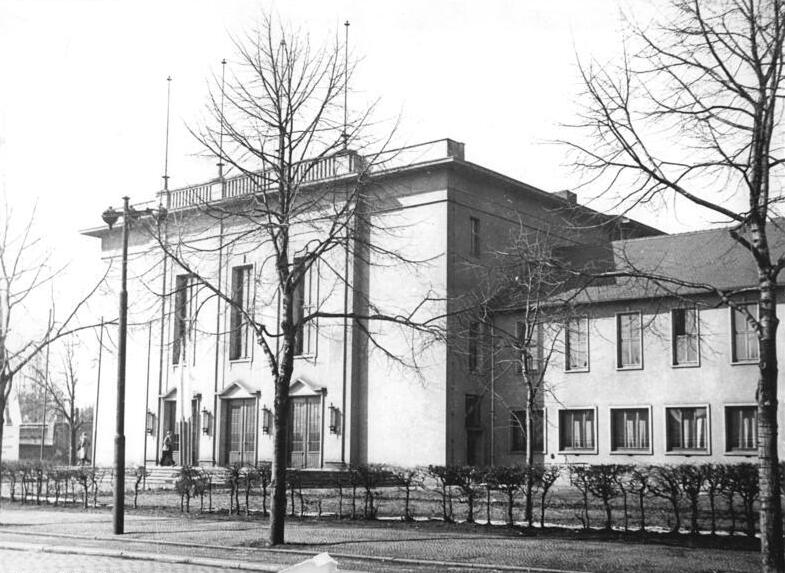 Zentralbild-Rösener Wjt-Ho. 4 Motive 24.3.1955 Klubhaus "Ernst Thälmann" in Magdeburg Aussenansicht des prächtigen Klubhauses der Gewerkschaften in der Erich-Weinert-Strasse, das den Namen "Ernst Thälmann" trägt."